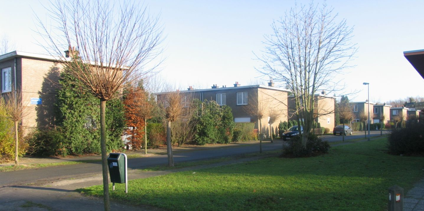 Mechelen, Oud Oefenplein, Zicht op de Sijsjesstraat, noordoostwaarts, foto Marc Alcide 25 december 2005